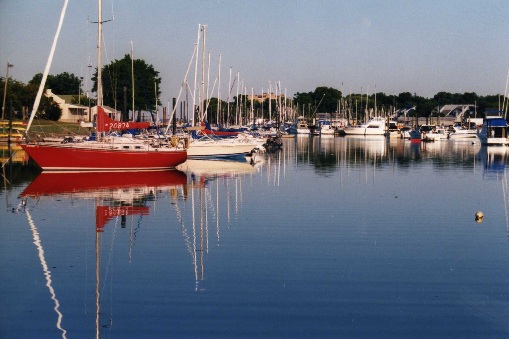 Mamaroneck Harbor